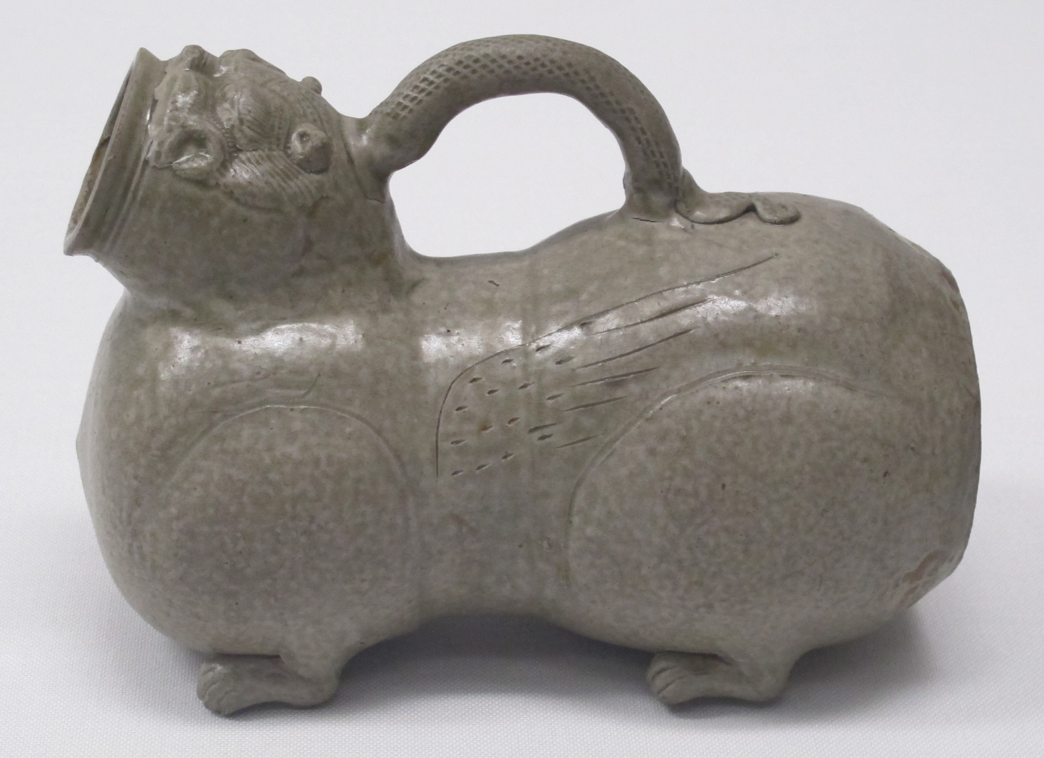 Dinastia jin occ.le-orientale, vaso a froma di tigre (orinale), III-IV sec